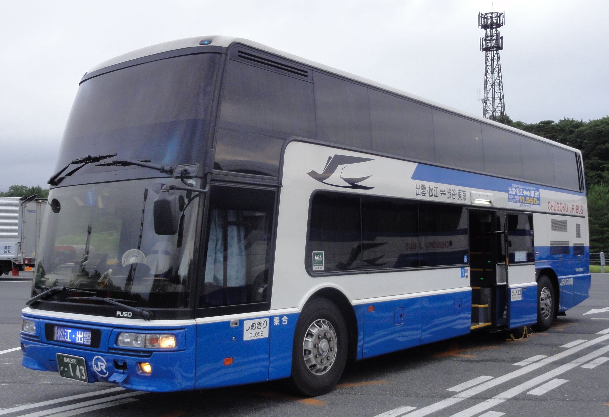 中国ジェイアールバス 744-2909